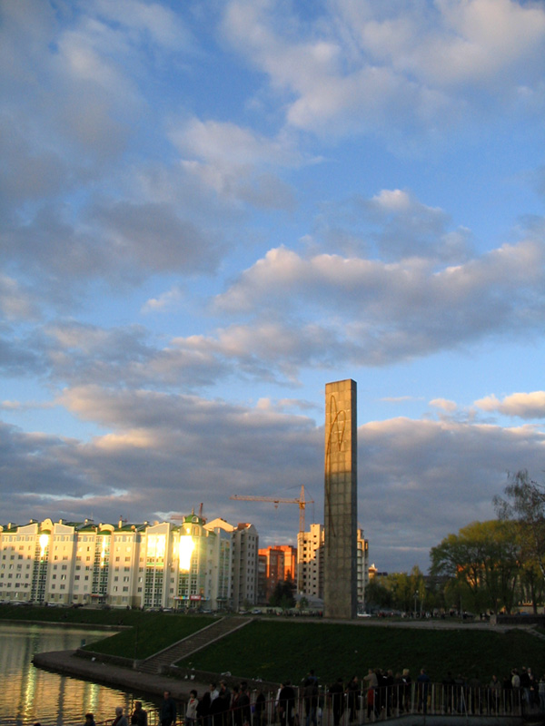 Oryol